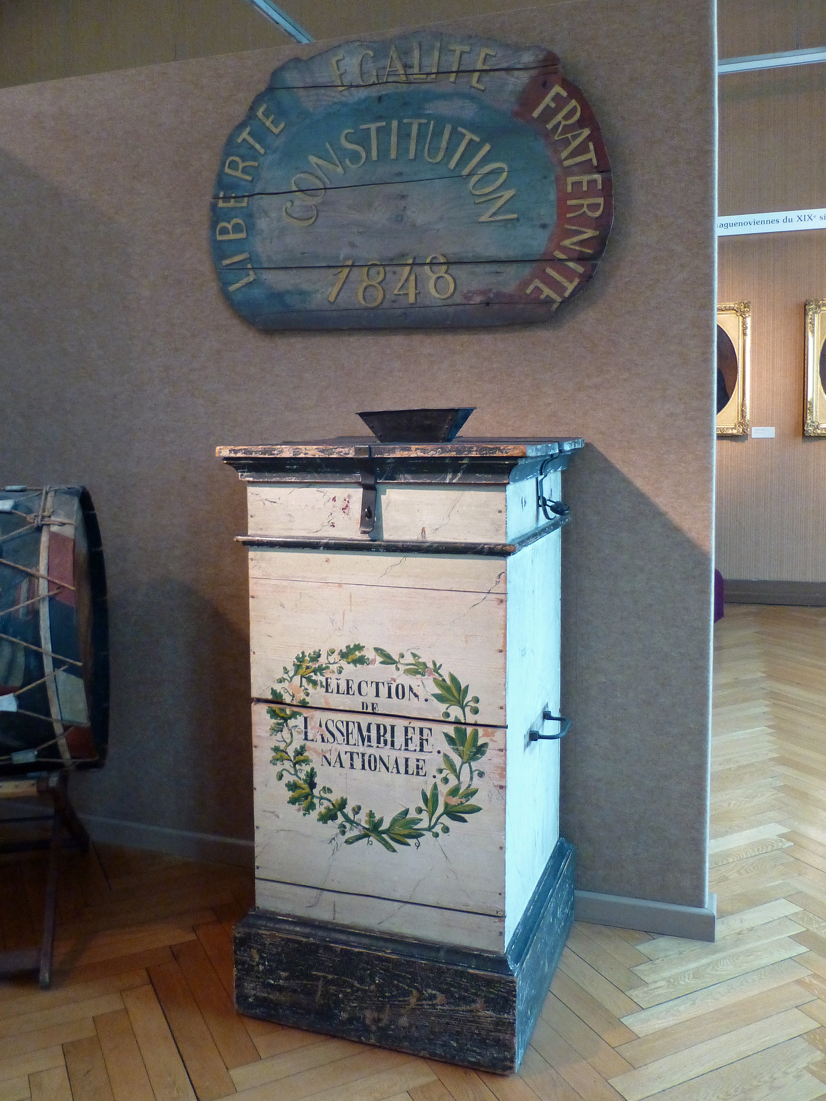 Musée historique de Haguenau (Bas-Rhin) : urne pour les élections législatives de 1848